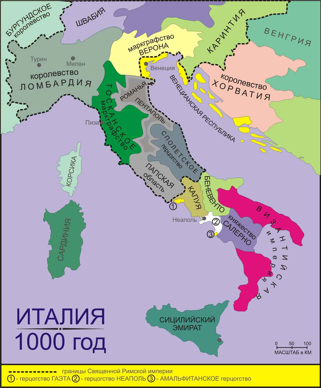 государства Аппенинского полуострова в 1000 году Н.Э.